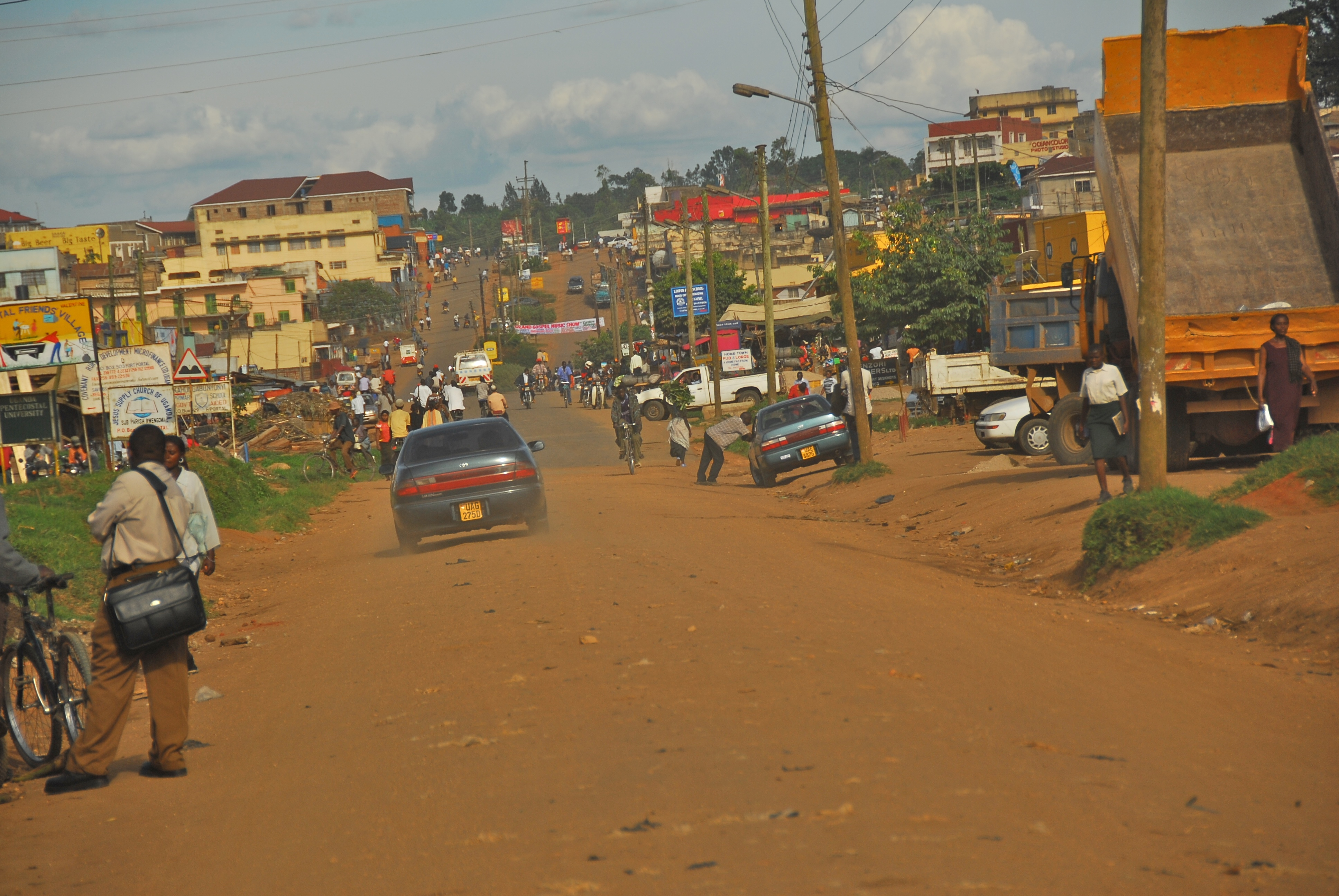 Fort Portal